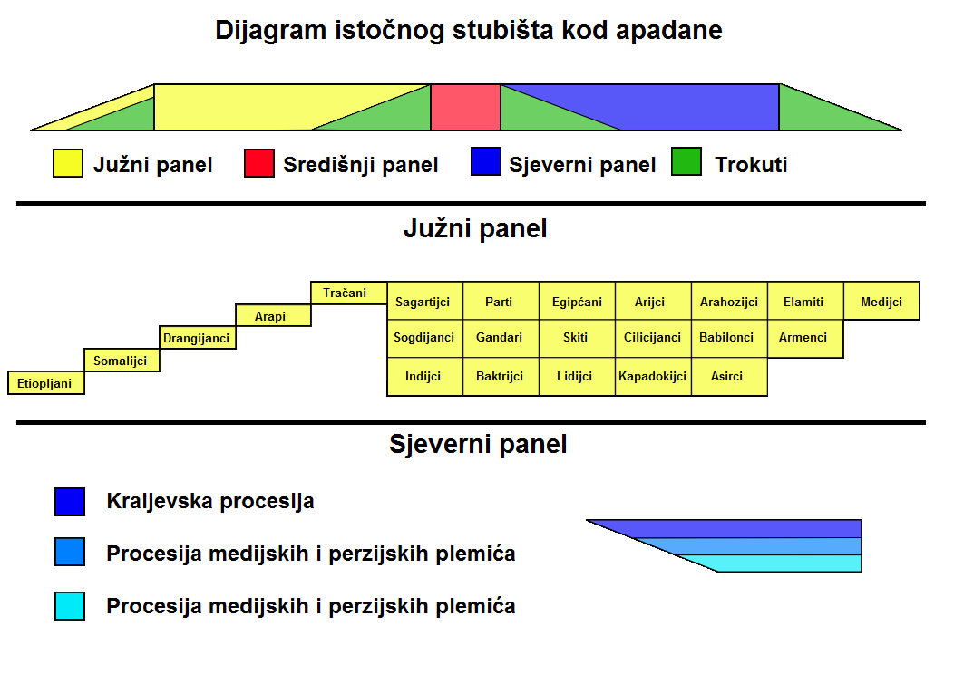 Shema istočnog stubišta kod apadane u Perzepolisu